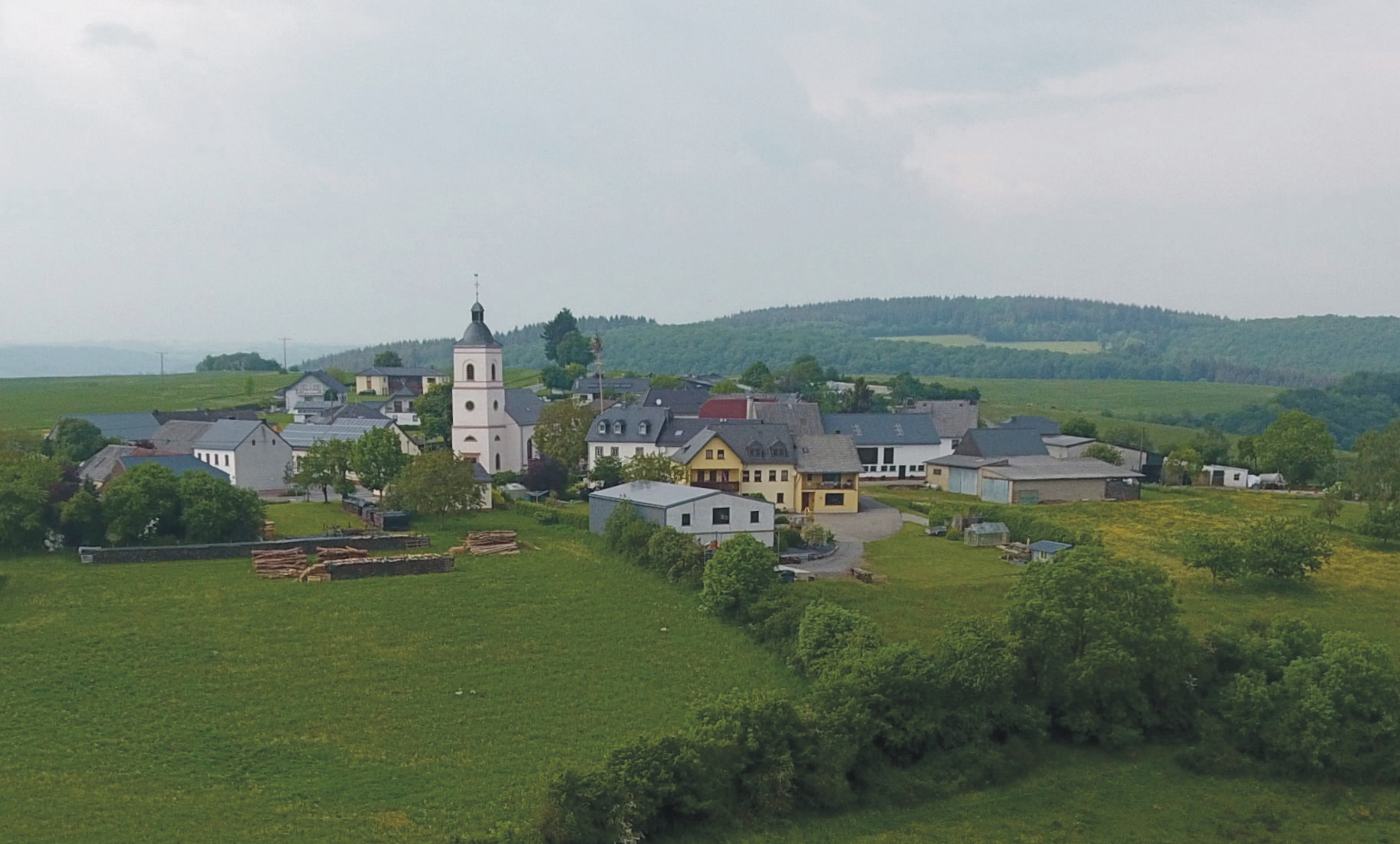 54689 Preischeid. Die Namensendung -scheid deutet auf eine Entstehung des heutigen Ortes in der späten mittelalterlichen Rodungsphase hin. Die erste urkundliche Nennung als Prinscheit stammt aus dem Jahre 1290. In der Feudalzeit gehörte der Ort zur Meierei Daleiden in der Herrschaft Dasburg, Herzogtum Luxemburg. Aufnahme von 2018.